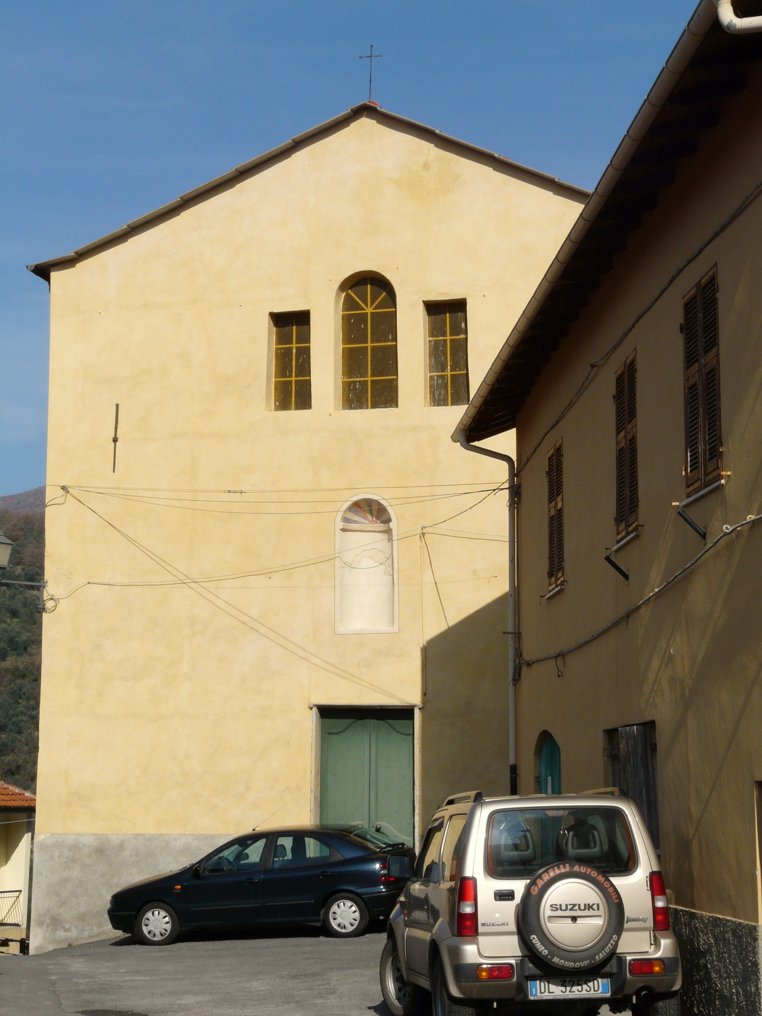 Oratorio di San Giovanni Battista, Aurigo, Liguria, Italia